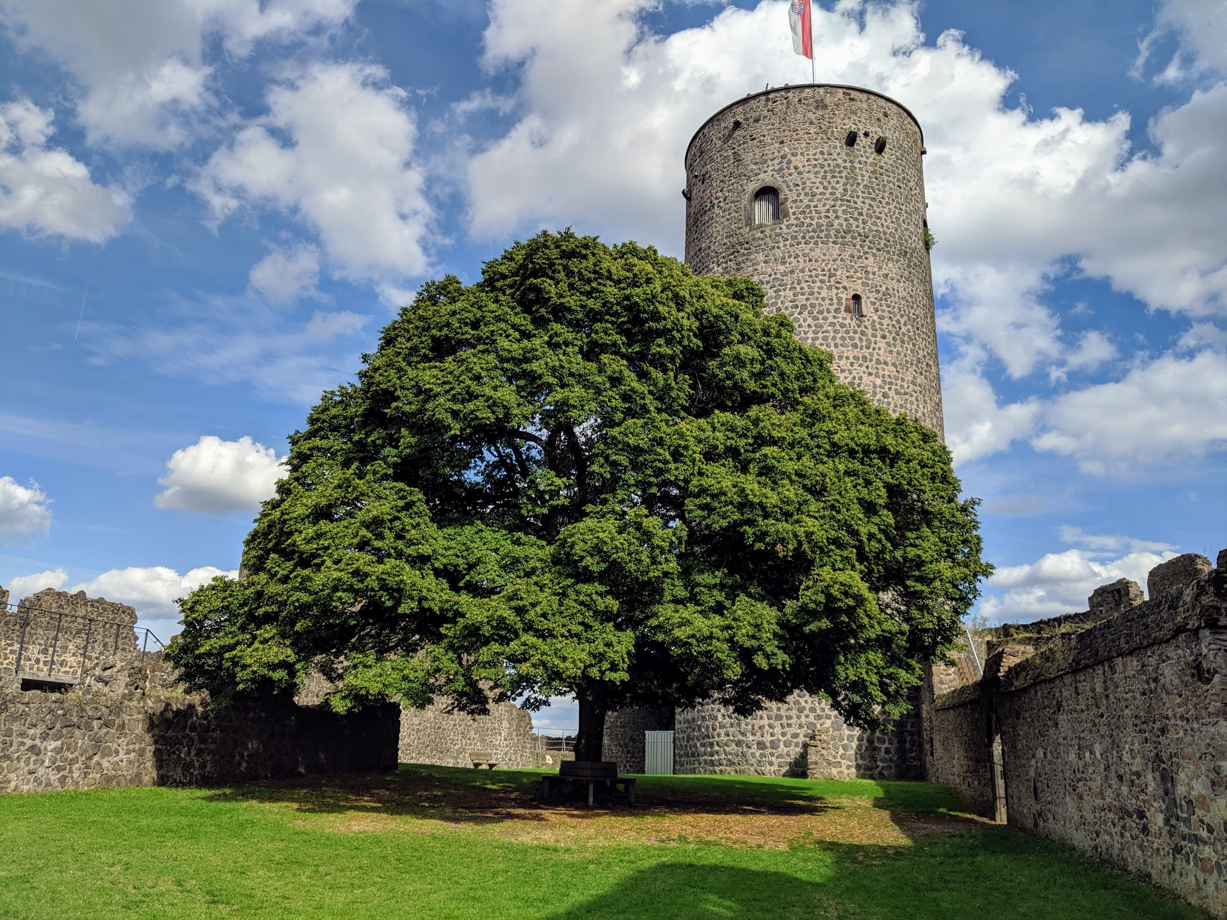 Burg Münzenberg, östlicher Bergfried mit alter Linde im Vordergrund.